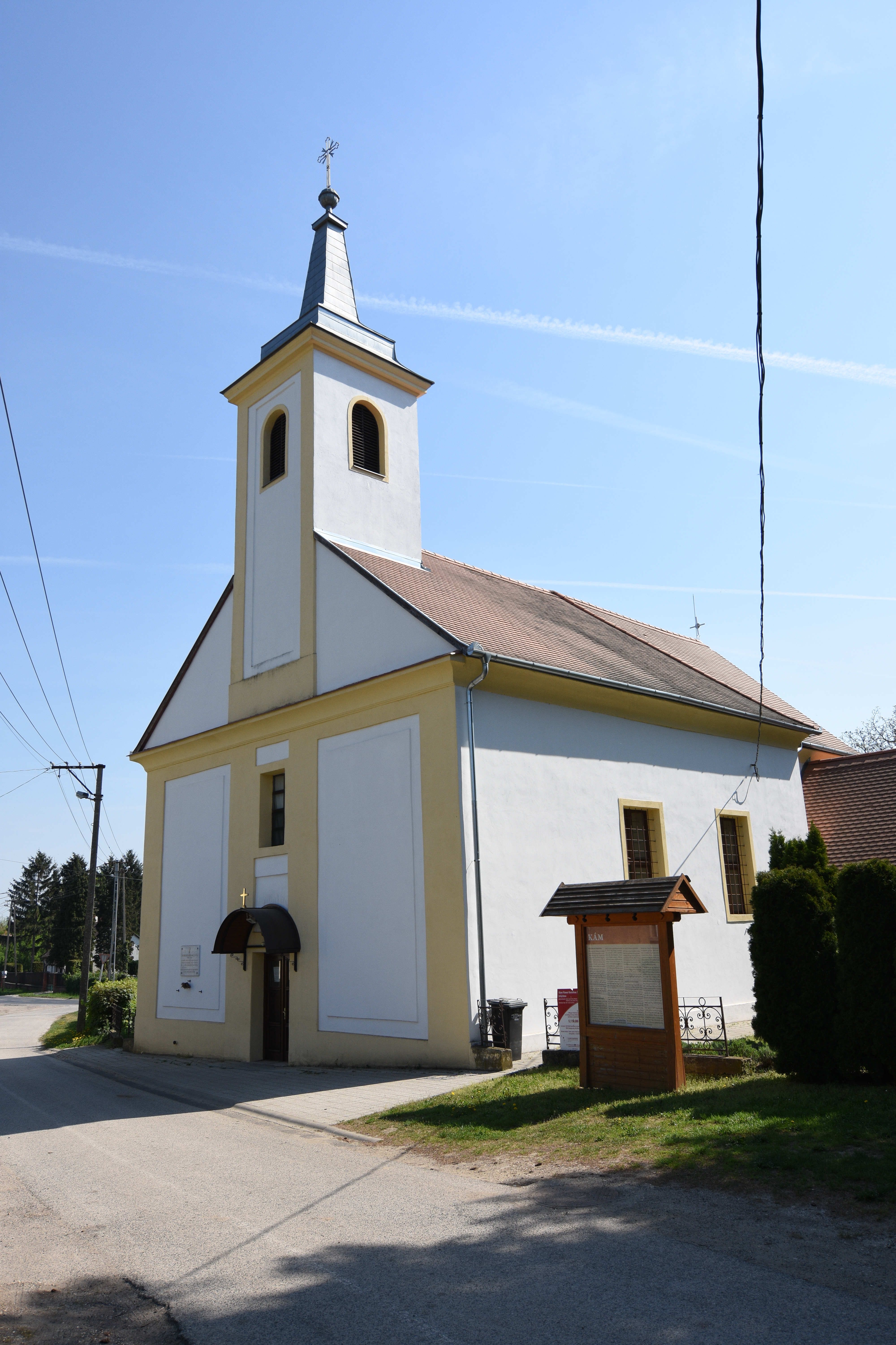 Roman Catholic Church in Kám